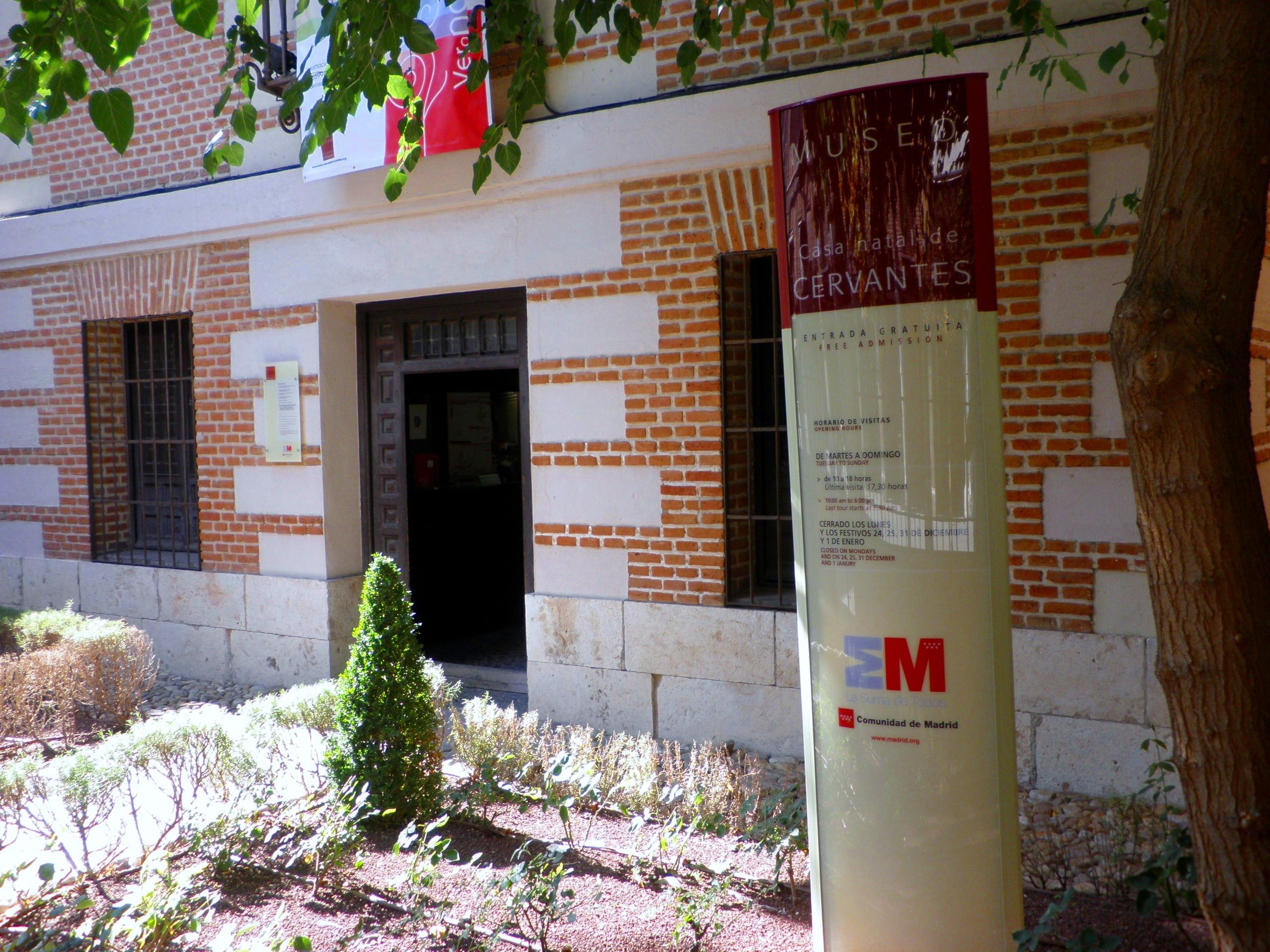 Alcalá de Henares, España.